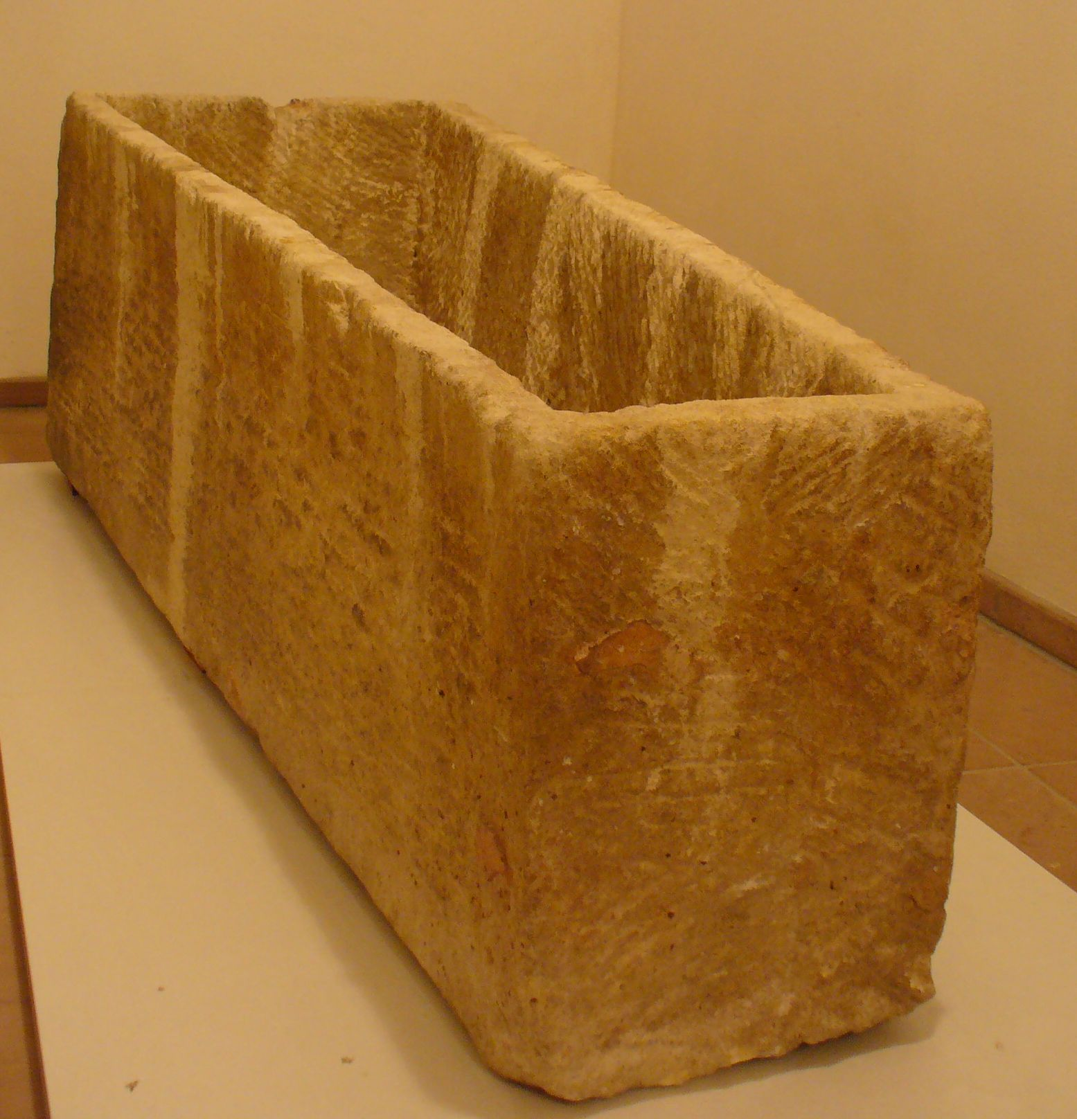 Lahr, Burgheimer Kirche, sarcophagus